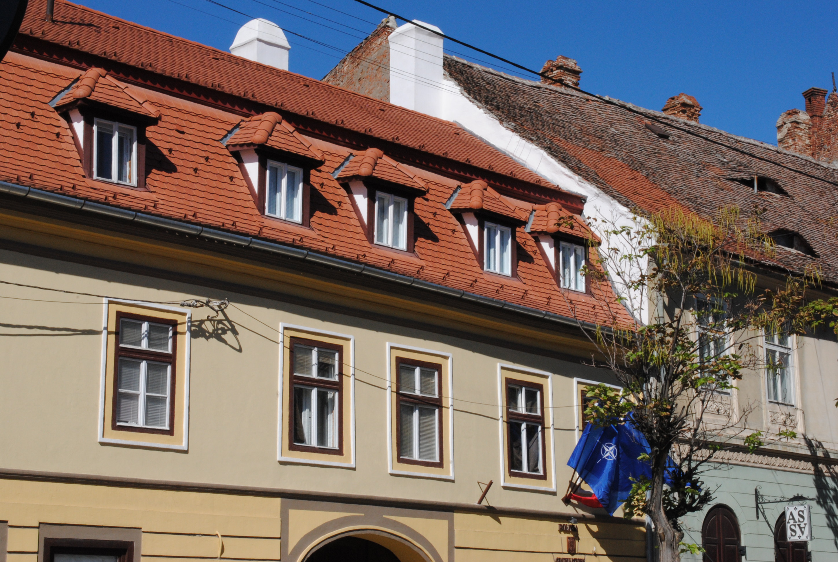 Casă, 1570, sf. sec. XVIII